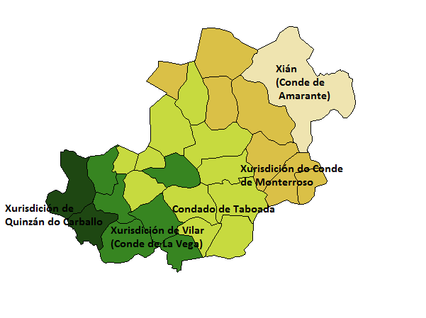 División xurisdicional do actual concello de Taboada durante o Antigo Réxime.